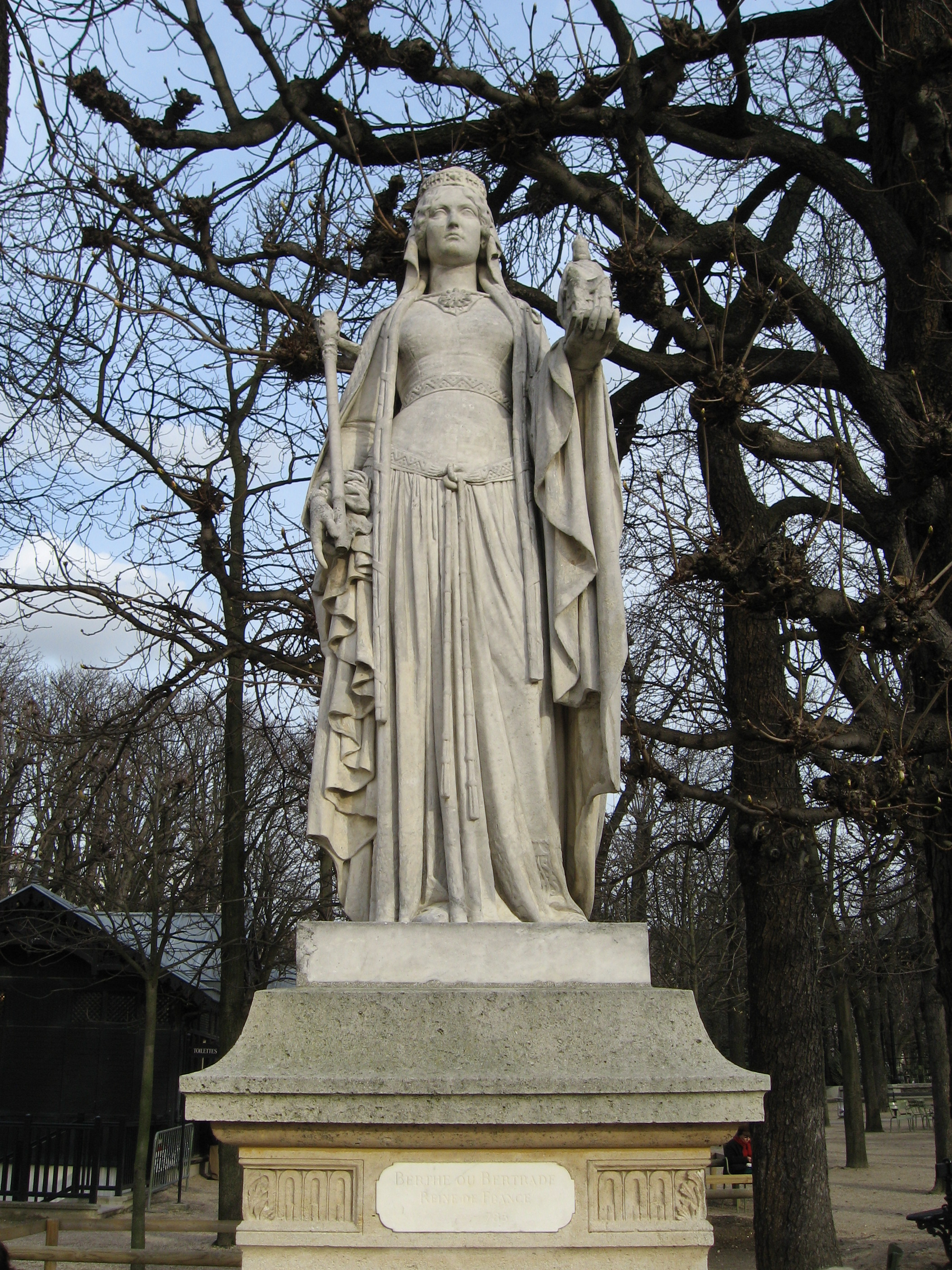 Eugène-André Oudiné (français, 1810-1887): Berthe au grand pied ou Bertrade ou encore La Reine Berthe, femme de Pépin le Bref et mère de Charlemagne, statue en pied (1848), marbre, Paris, Jardin du Luxembourg. Commande d'Etat. Voir Bertrade de Laon (726-783).